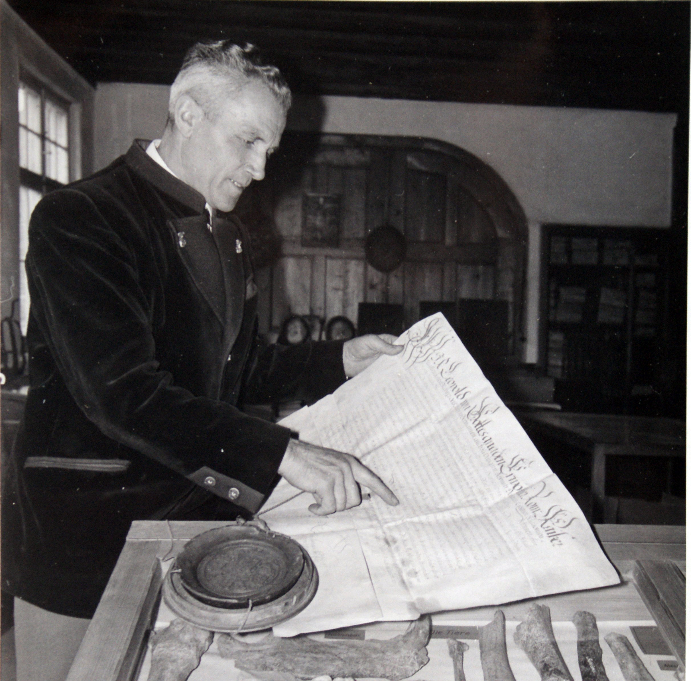 Stefan Fink (*1908, †2000), Bürgermeister von Veringenstadt (1945-1966), im Heimatmuseum des Rathauses mit der Urkunde zur Marktgerechtigkeit von König Rudolf IV. v. Habsburg aus dem Jahre 1285.